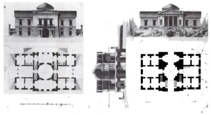 Villa built for margravine Christiane Louise